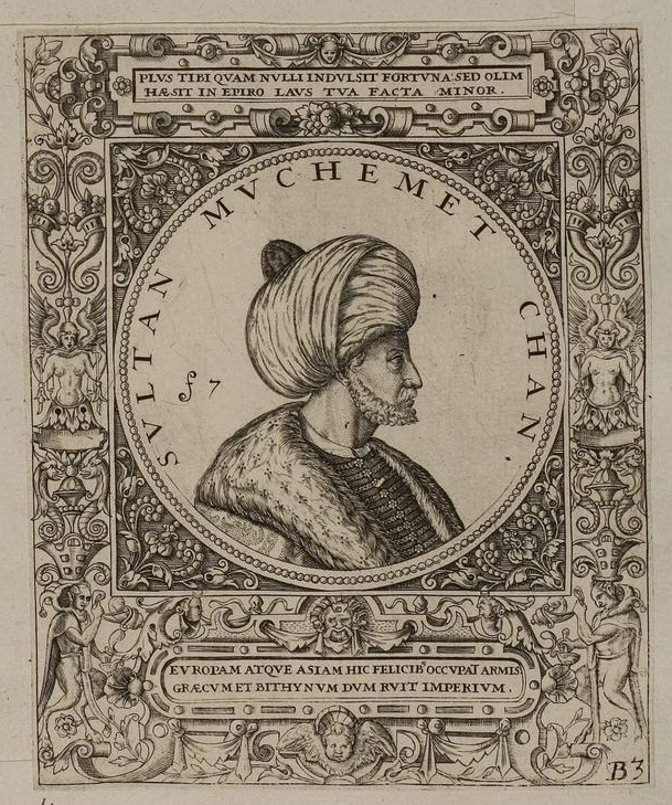 Grafik aus dem Klebeband Nr. 1 der Fürstlich Waldeckschen Hofbibliothek Arolsen Illustration aus: Georg Greblinger: Wahre Abbildungen der Türckischen Kayser vnd Persischen Fürsten / so wol auch anderer Helden und Heldinnen von dem Osman / biß auf den andern Mahomet. Johann Ammon, Frankfurt 1648 Motiv: "Sultan Muchemet Chan" (Mehmed II.)